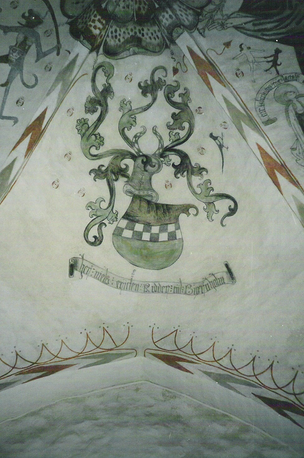 Niels Eriksen Rosenkrantz våbenskjold i skibet i Marie Magdalene Kirke. Fotograferet 2001 af undertegnede. Sommer 11. nov 2007, 02:28 (CET)